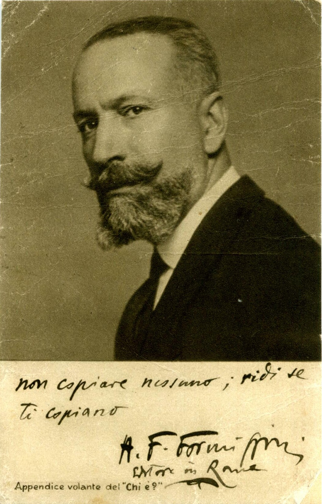 Portrait du philosophe Angelo Fortunato Formiggini.